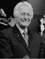 Photographie personnelle de Jean-Paul L'Allier. Photographie convertie en noir et blanc.